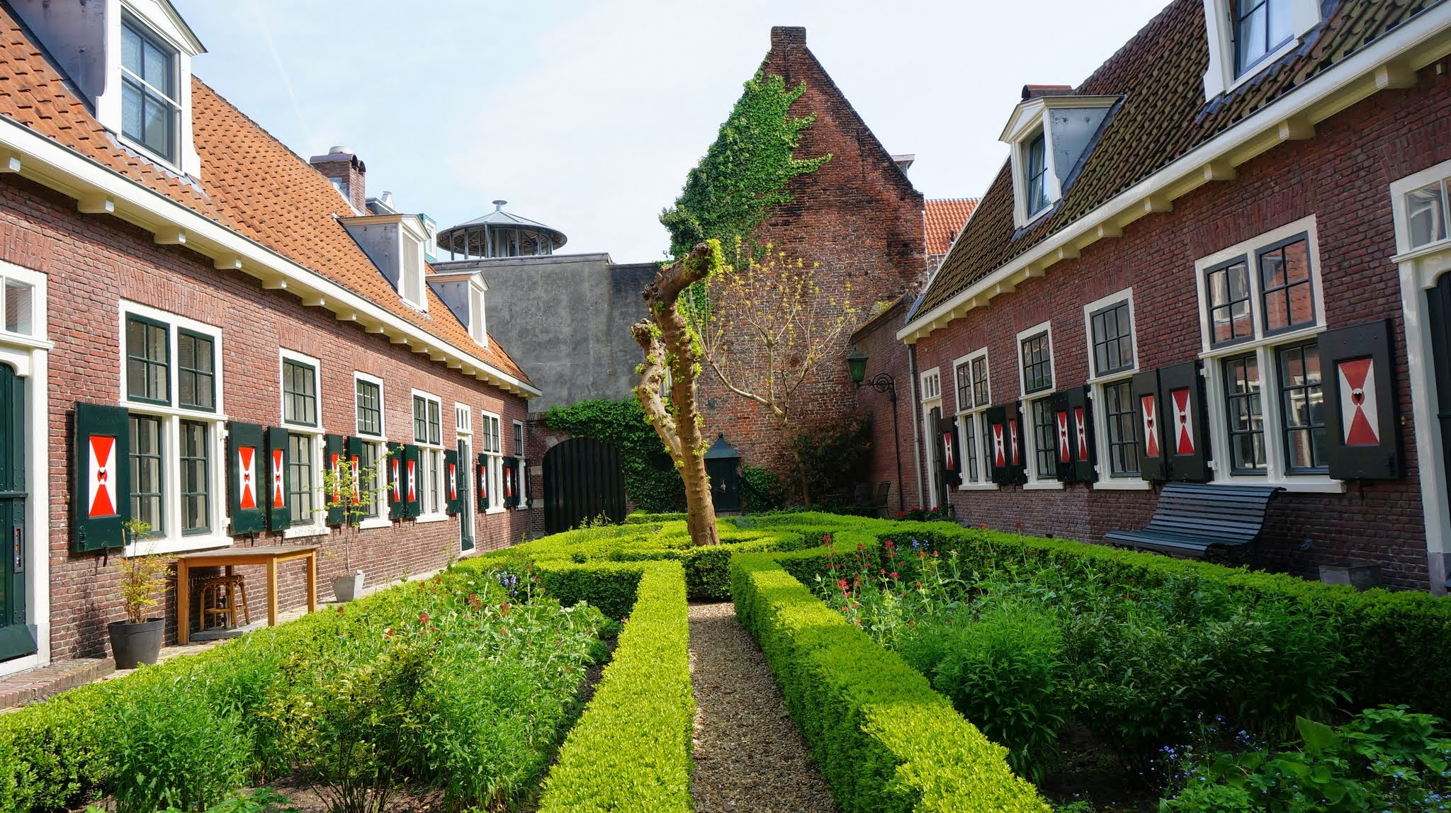 Deventer, Netherlands